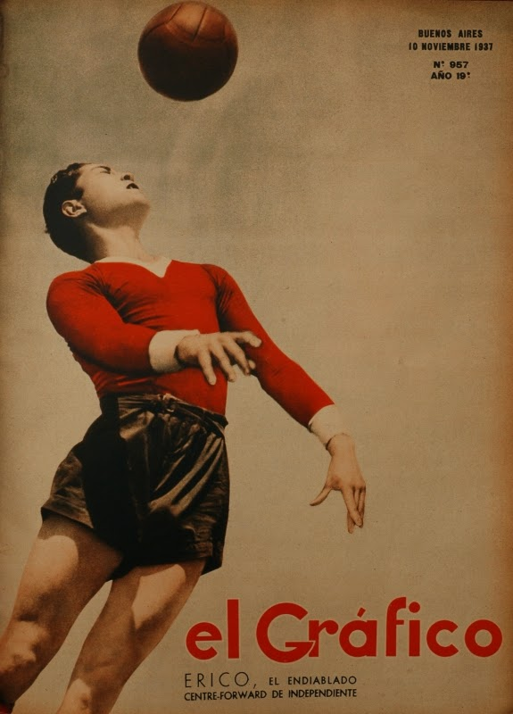 Arsenio Erico, goleador de Independiente. El Gráfico, 1937, Nº 957.